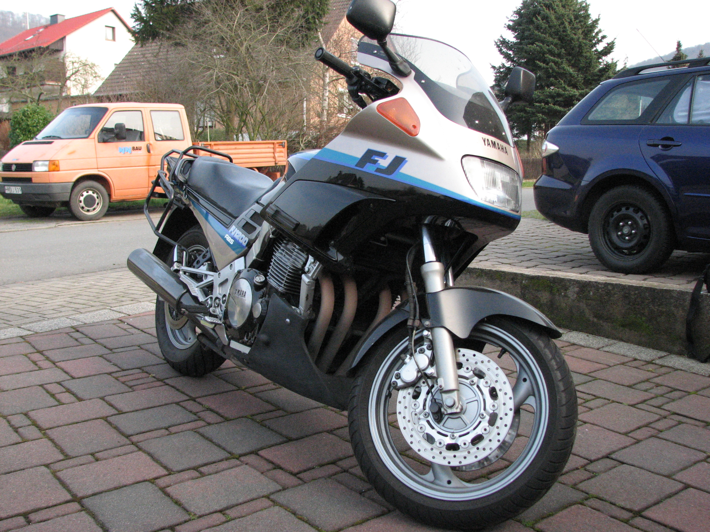 FJ 1200 Typ: 3YA selbst fotografiert